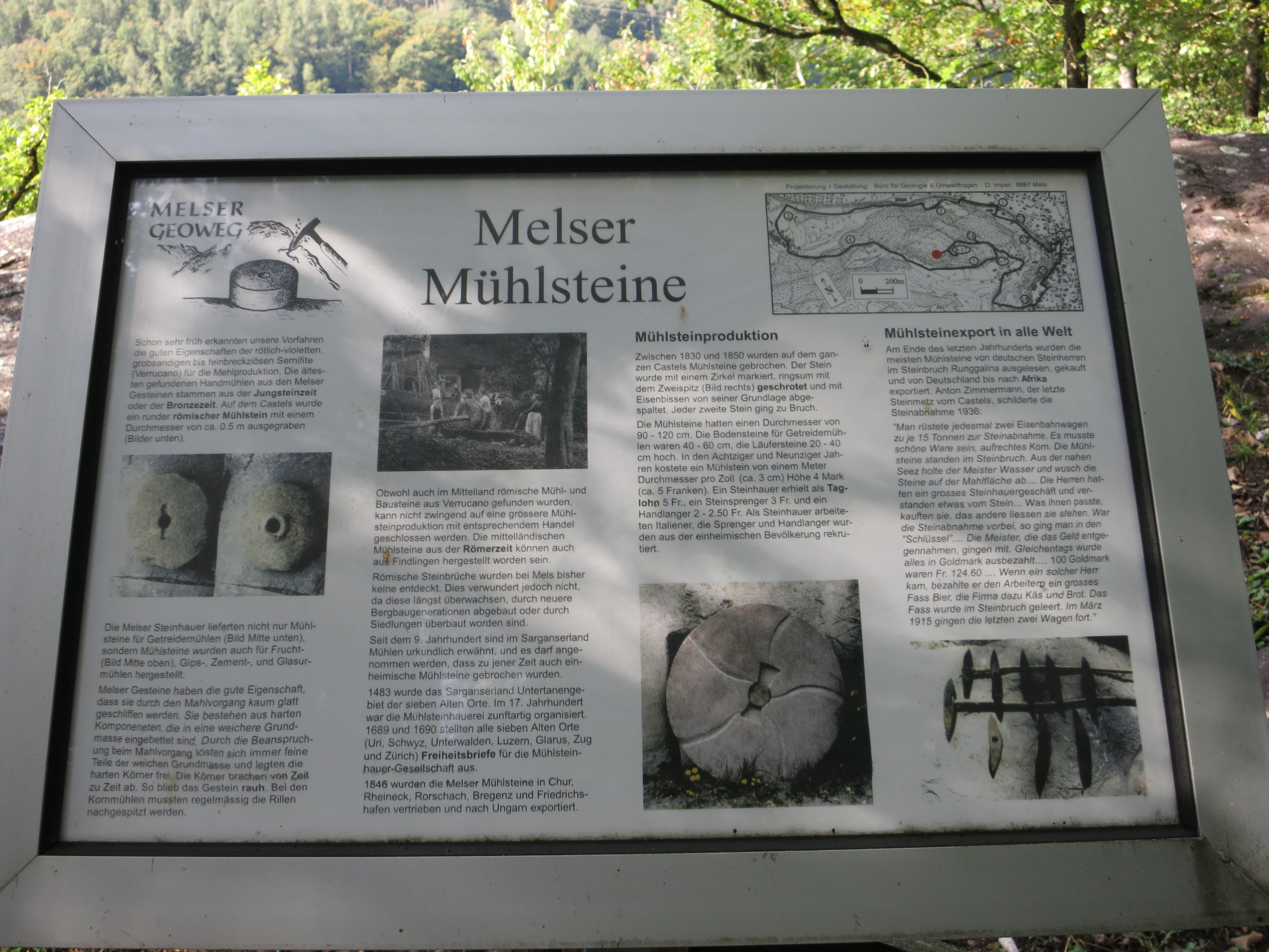 Mühlsteinbruch Castels, Mels SG, Schweiz